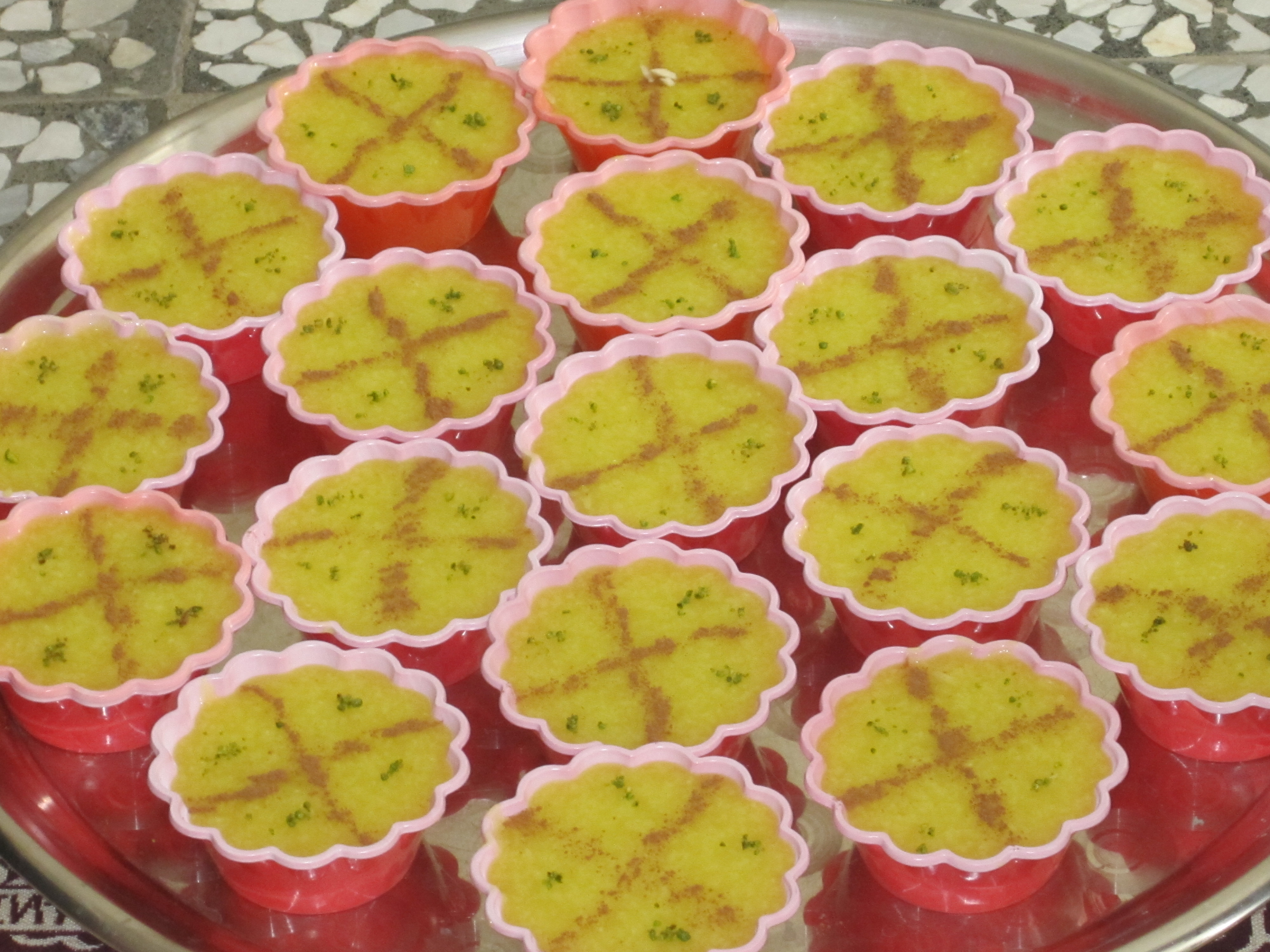 مازِرونی: شله زرد ِآش که نیمه شعبون وسّه بپتنه و جا دَکاردنه.